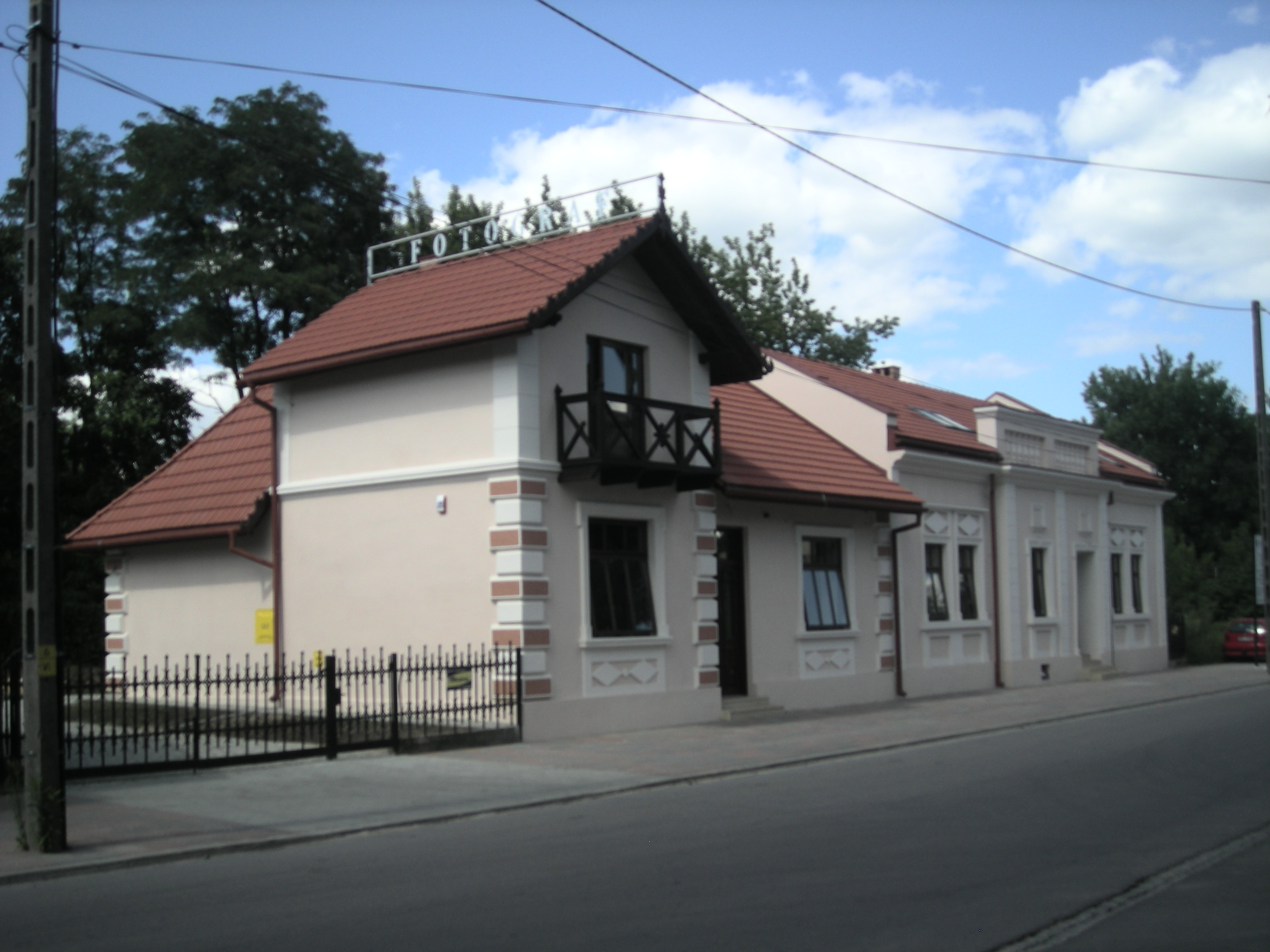 tzw. Jadernówka i dom przy ul. Jadernych 21 w Mielcu (zabytek nr rejestr. 1134)